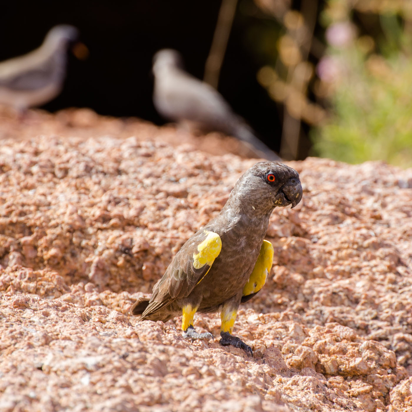 Rüppells parrot-5256